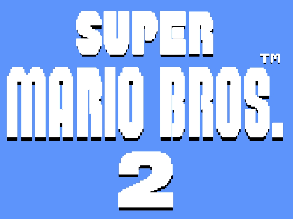 Logo von Super Mario Bros. 2